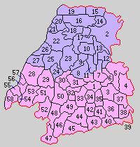 愛知県中島郡の町村制時点の町村。